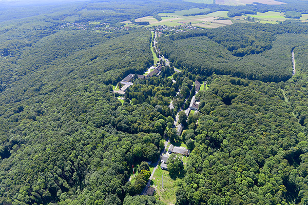 A farkasgyepüi tüdőgyógyintézet látképe a magasból